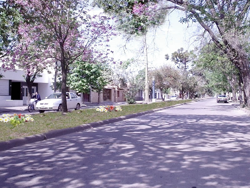 Avenida